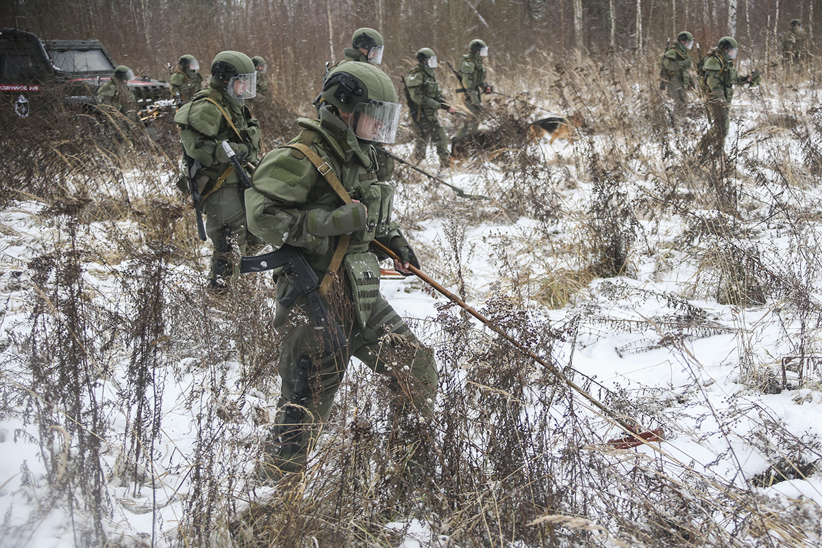 Подготовка младших специалистов Инженерных войск ВС РФ в 66-м межведомственном учебном методическом центре (Николо-Урюпино, Московская область). Сапёры в защитном костюме ОВР-2-02.